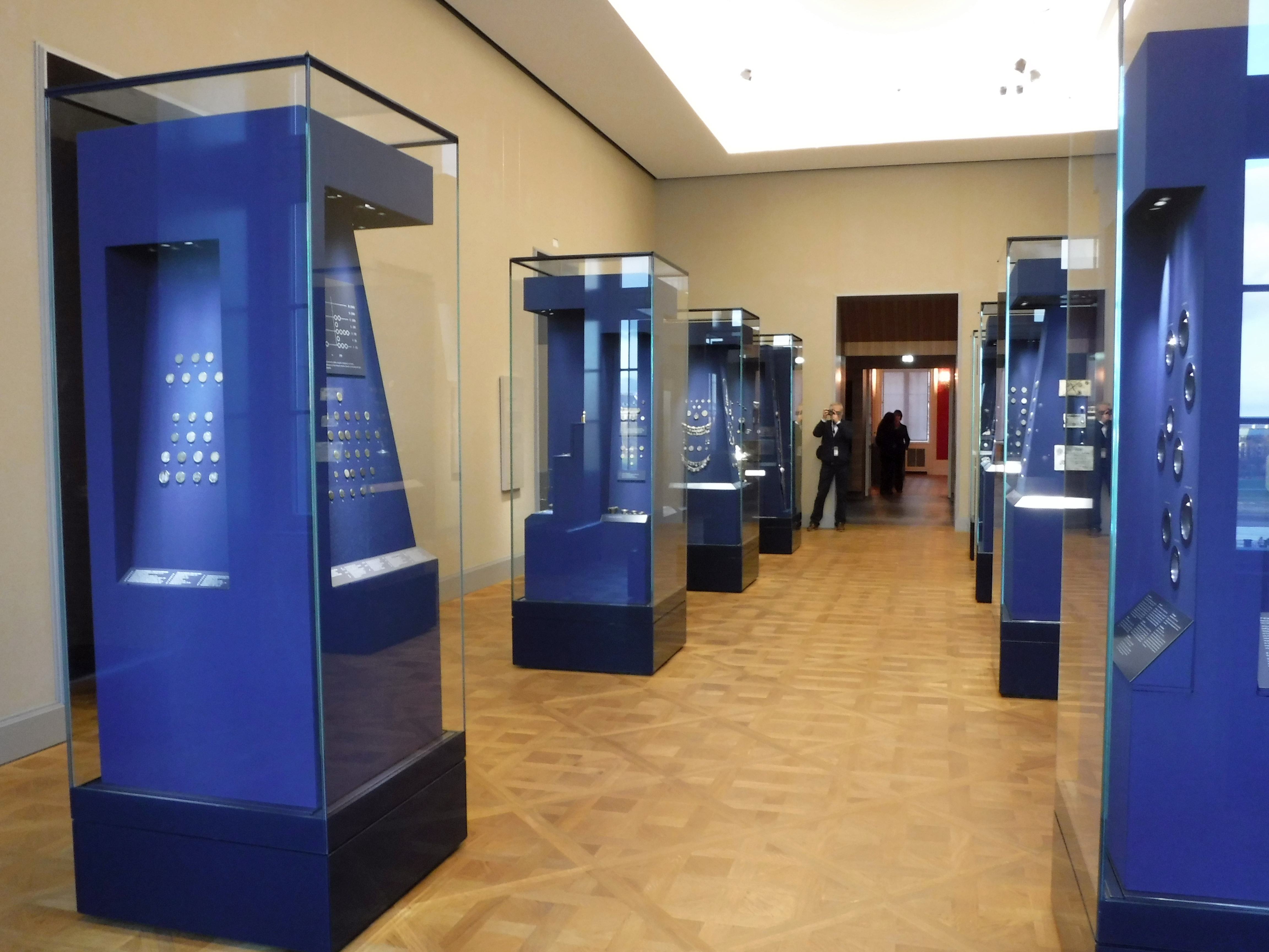 Ausstellungsraum im Münzkabinett Dresden